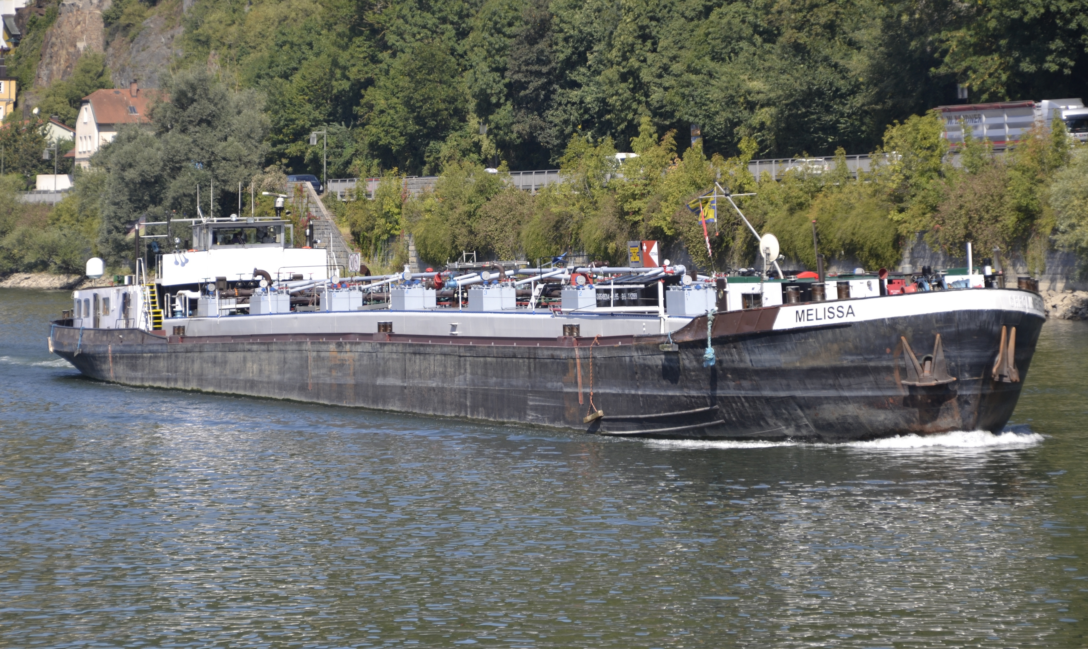 Das Binnenschiff "Melissa" auf der Donau in Passau.